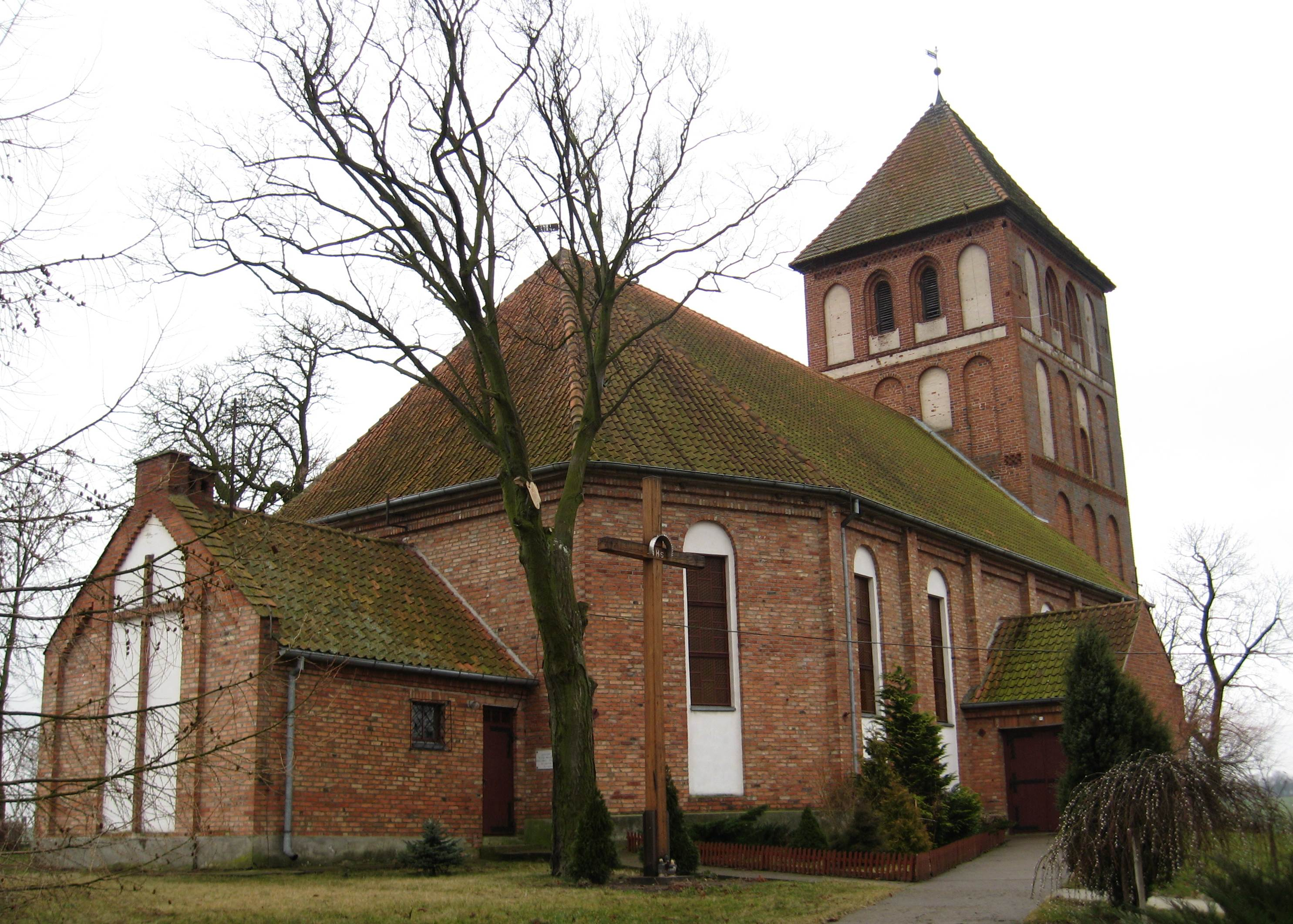 Garbno - rzymskokatolicki kościół parafialny p.w. Matki Bożej Królowej Polski, 1 poł. XV, 1824